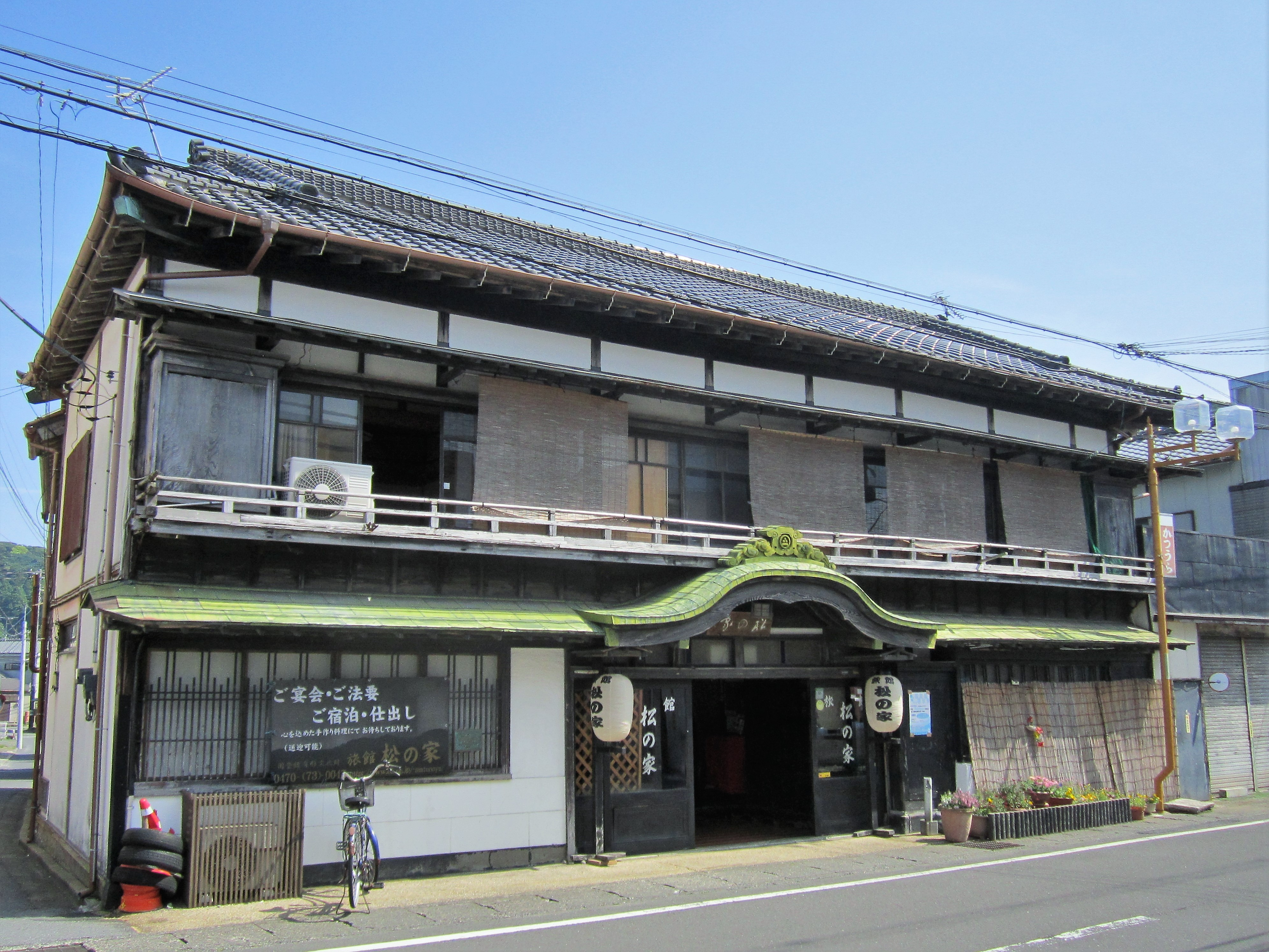 旅館松の家（勝浦市勝浦） Canon PowerShot A2200